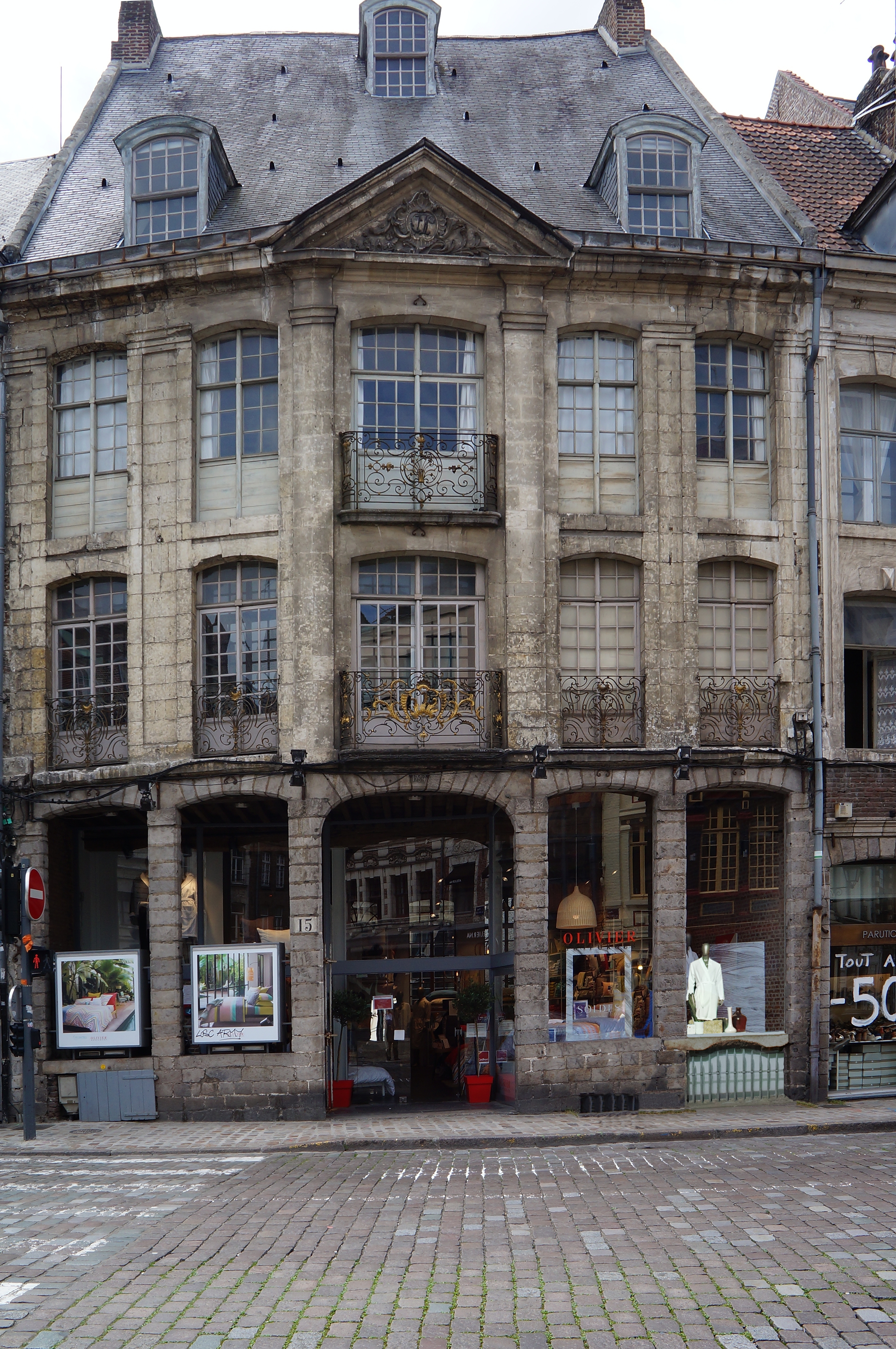 Maison 15 place du Lion-d'Or à Lille Nord (département français) .